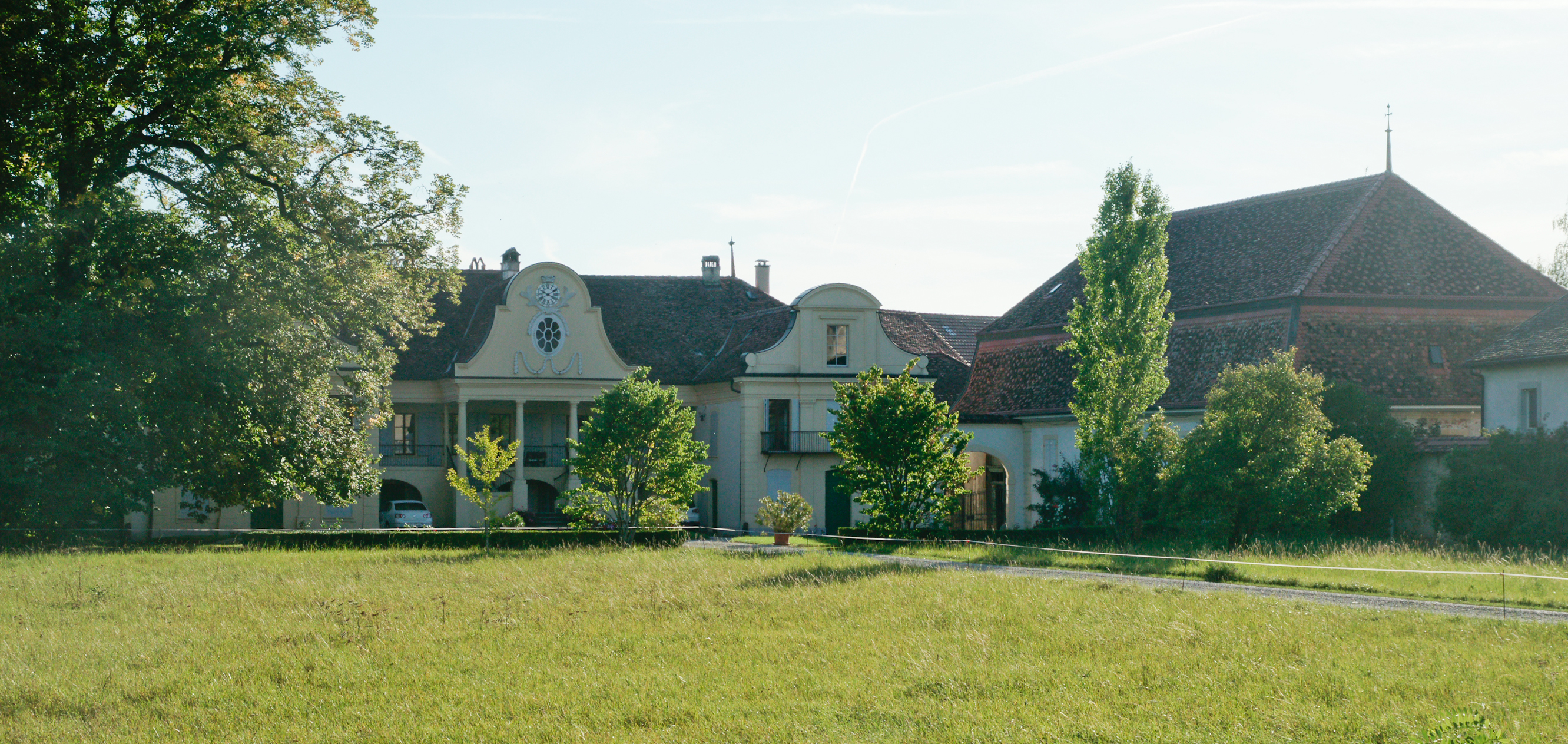 Château de Mathod et ses dépendances